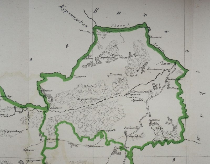 Дер. Пента расположена на левом берегу реки Дисенка (Дисна) между Козянами и Шарковщизной